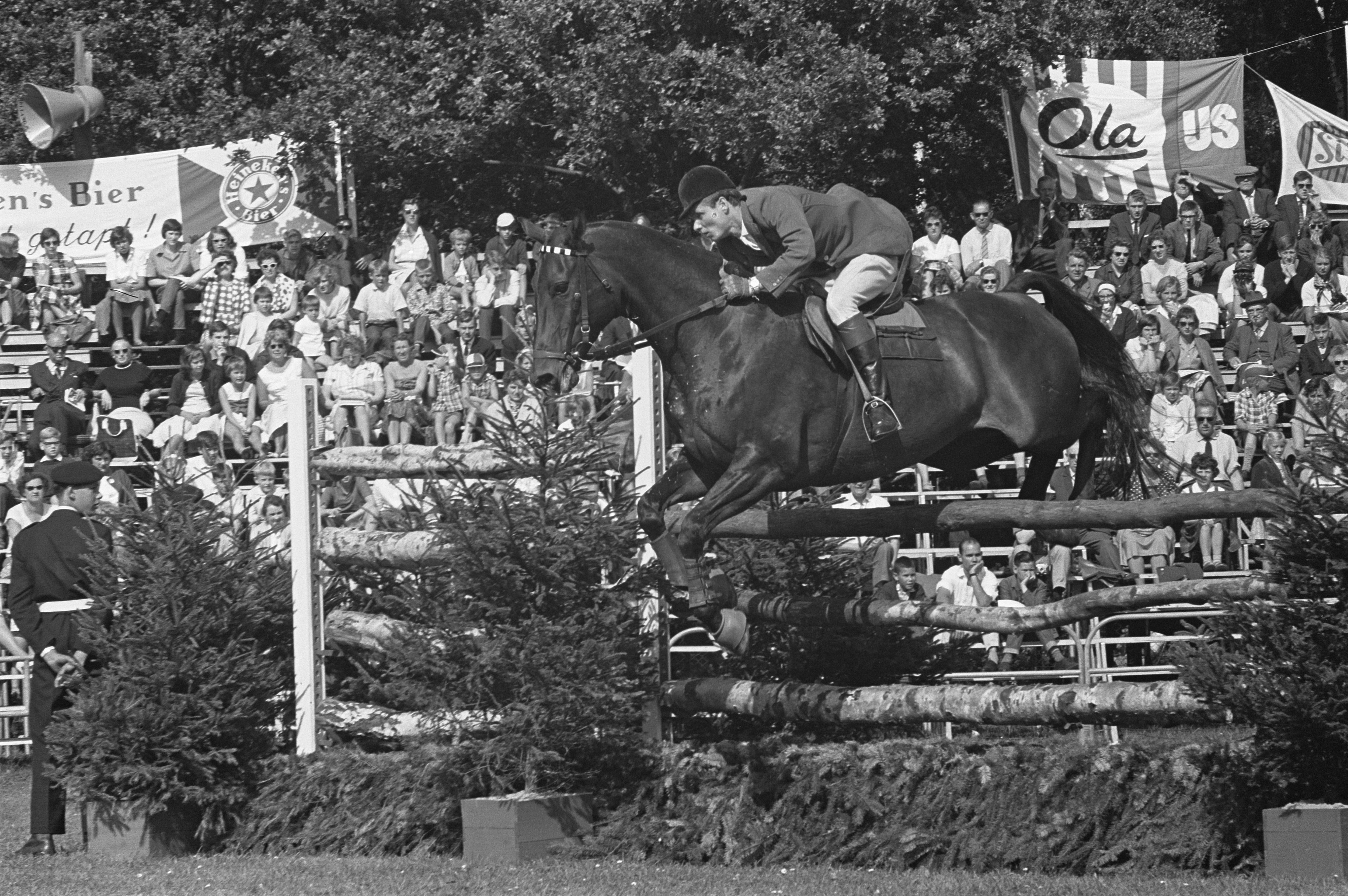 Collectie / Archief : Fotocollectie Anefo Reportage / Serie : [ onbekend ] Beschrijving : CHIO te Rotterdam, Herman Schridde op Ilona (Duitsland) Datum : 29 augustus 1962 Locatie : Duitsland, Rotterdam Trefwoorden : concoursen Instellingsnaam : CHIO Fotograaf : Koch, Eric / Anefo Auteursrechthebbende : Nationaal Archief Materiaalsoort : Negatief (zwart/wit) Nummer archiefinventaris : bekijk toegang 2.24.01.05 Bestanddeelnummer : 914-2467